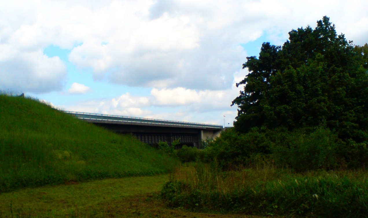 Trogbrücke des Main-Donau-Kanales (219 m) bei Neuses, (überspannt gleichzeitig die Schwarzach und die Kreisstraße)